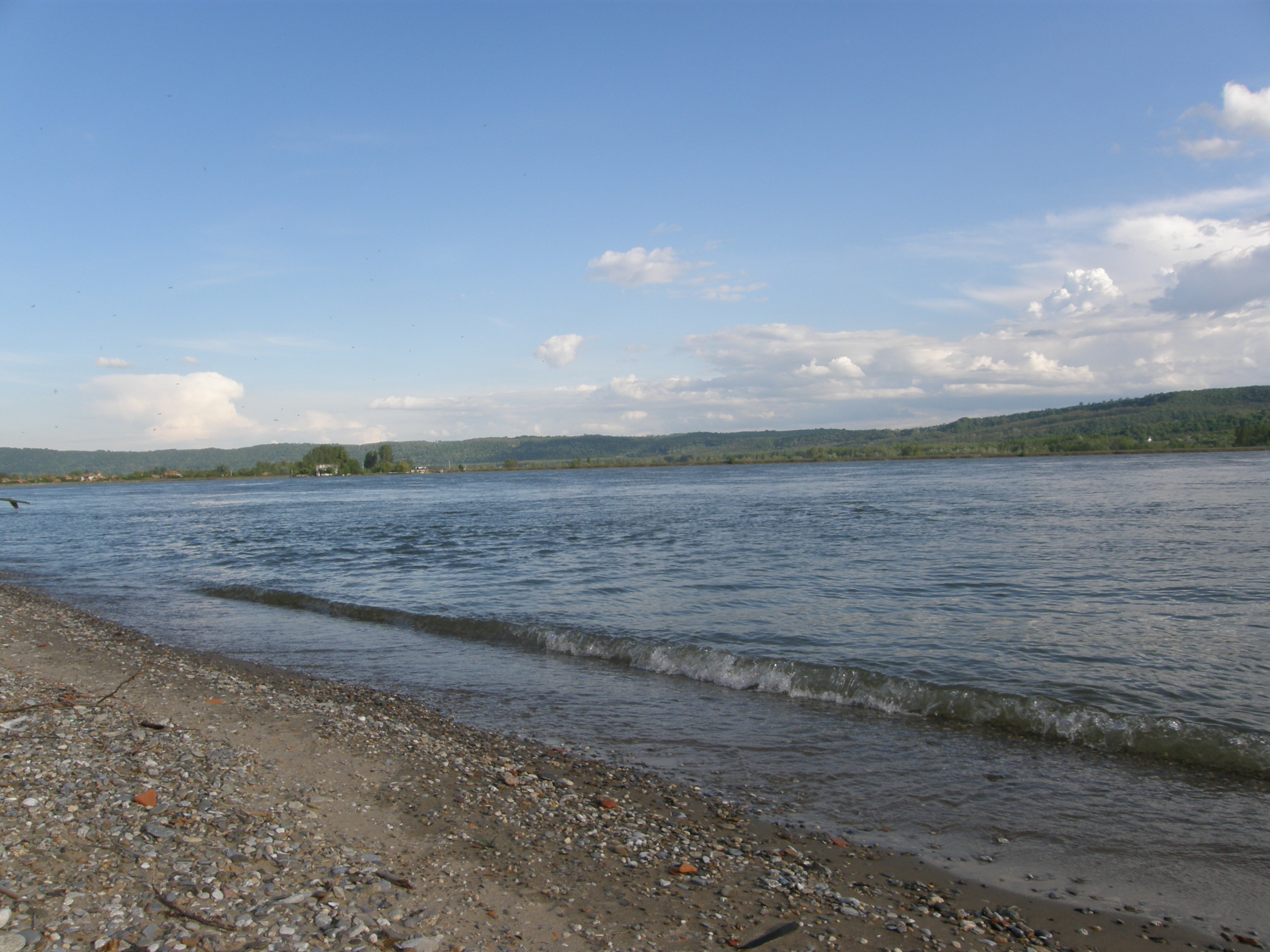 Плажа Корбову / Plaža Korbovu